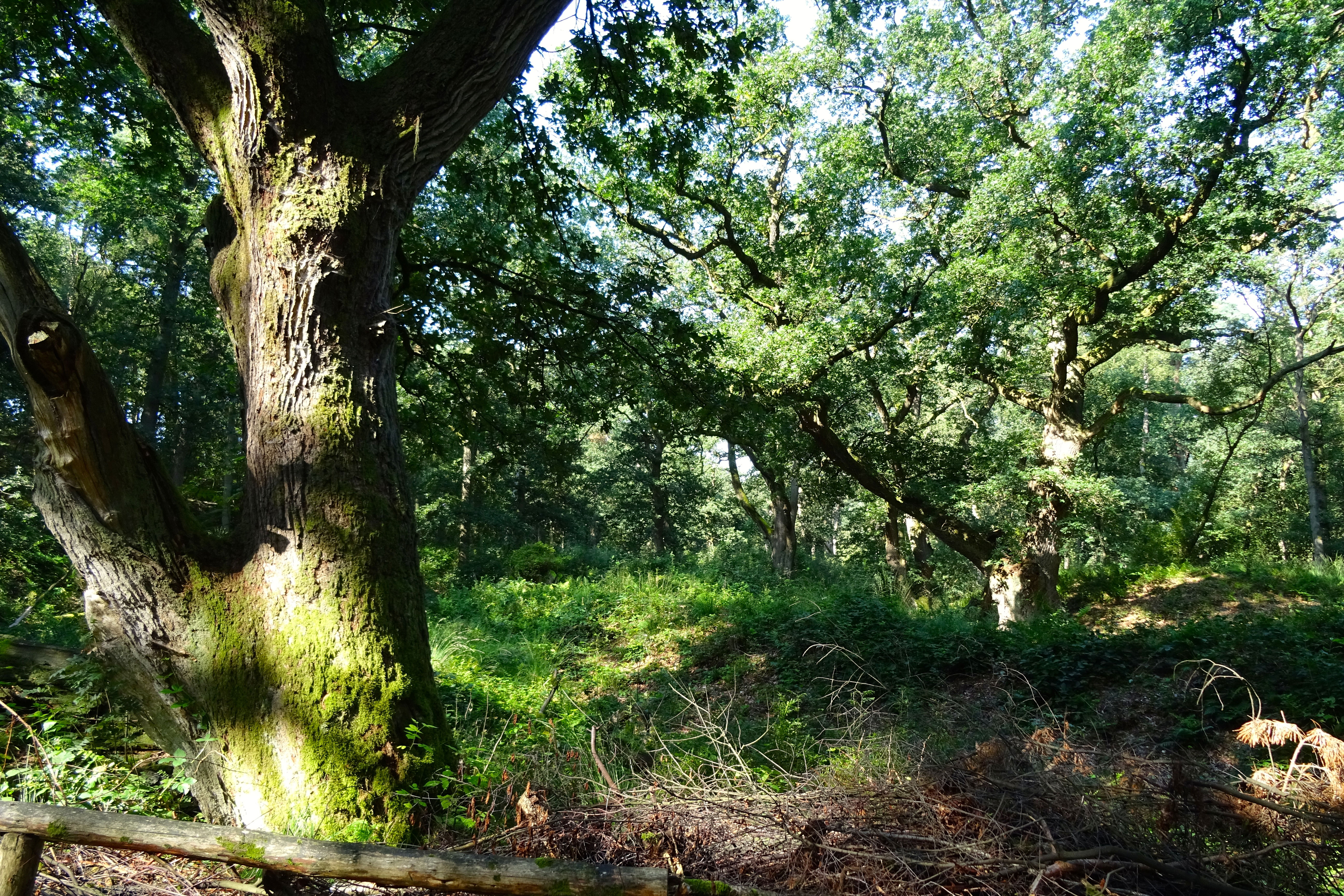 Wodanseiken in de Wolfhezerbosschen